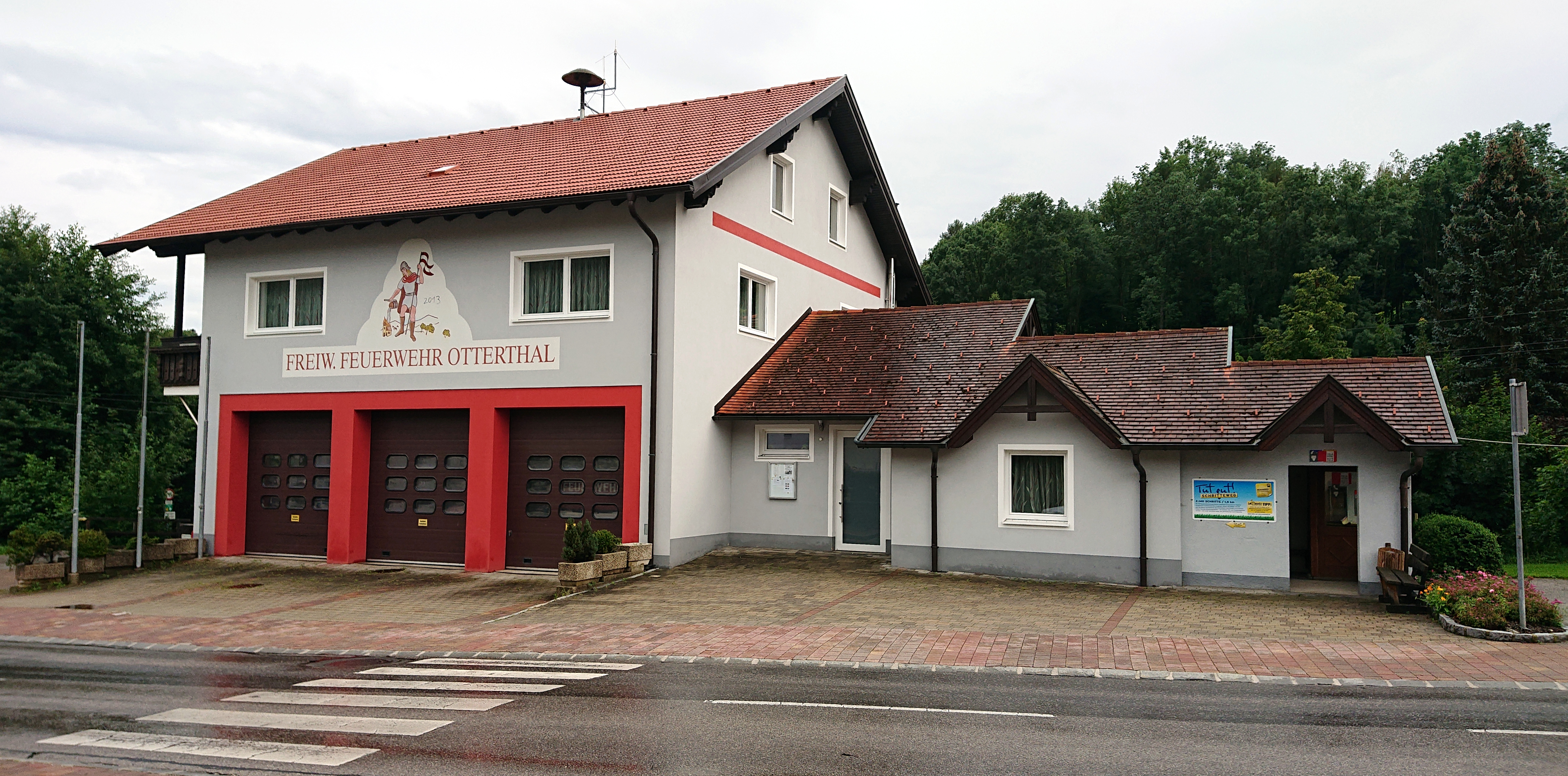 Feuerwehrhaus in Otterthal, Niederösterreich, mit integriertem öffentlichen Telefon und Bushaltestelle. 'Q97157587' (Q97157587)